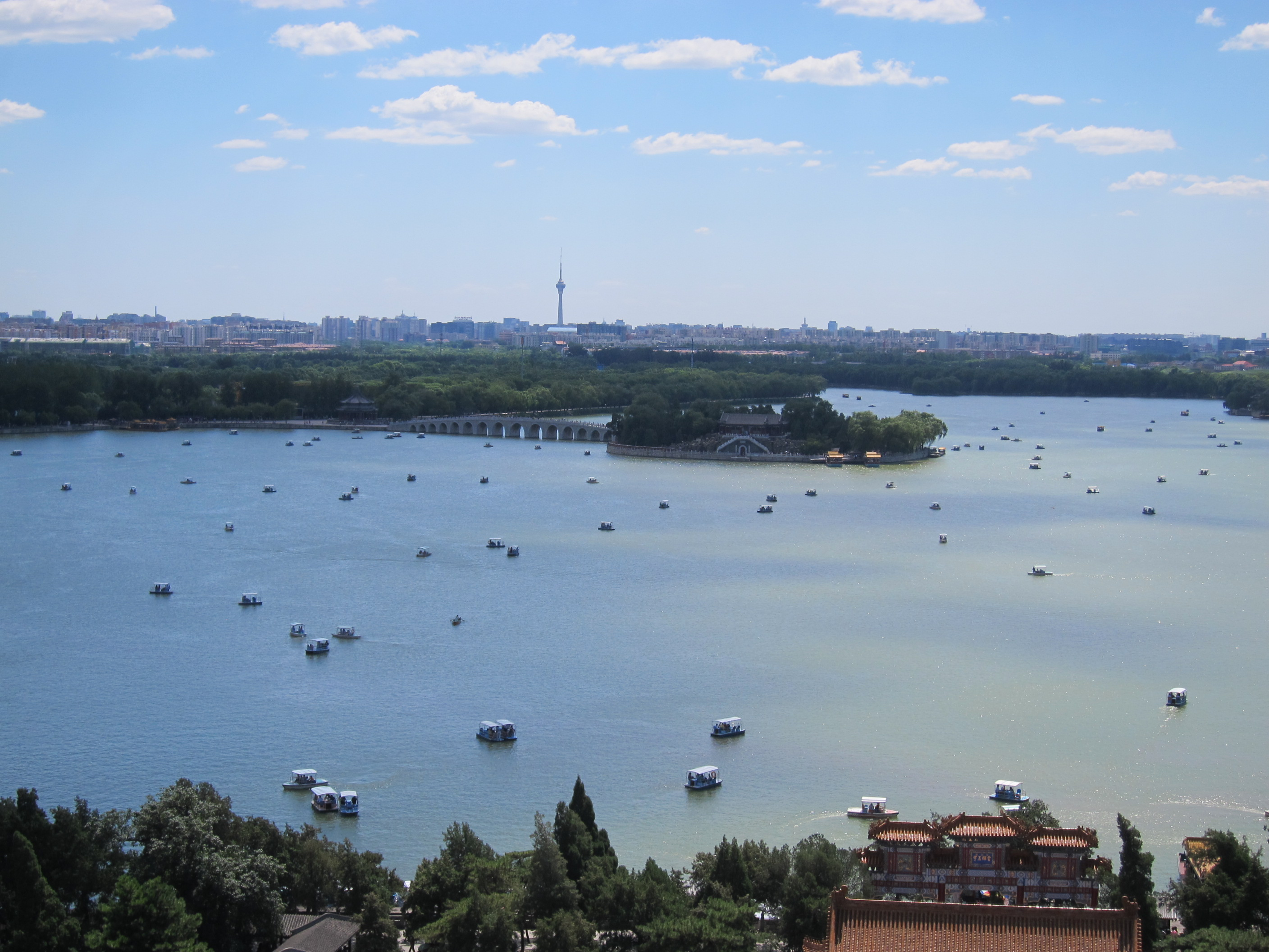 夏季的頤和園昆明湖中文（中国大陆）: 夏季的颐和园昆明湖